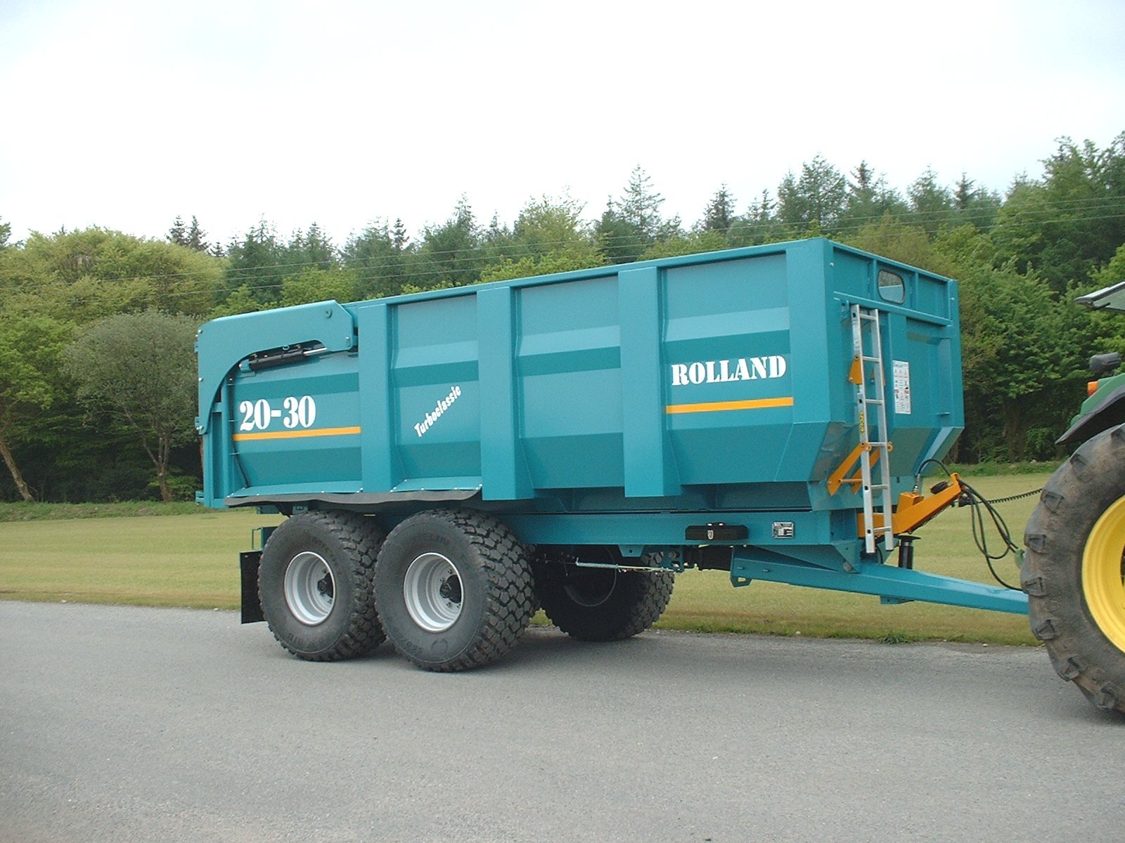 Remorque semi-portee céréalière, France